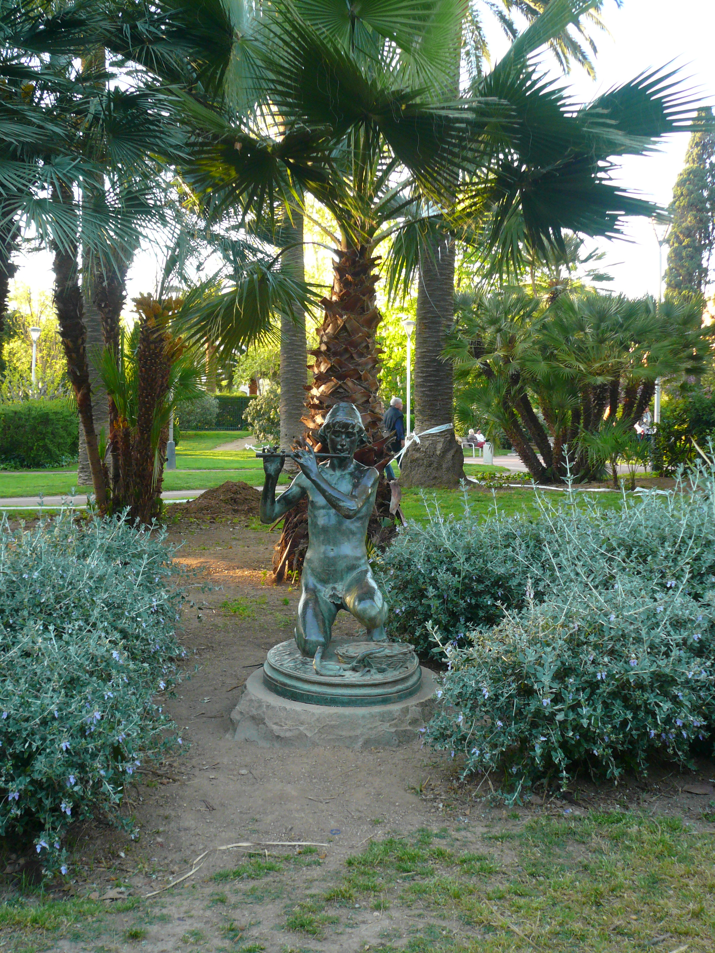 L'encantador de serps. Jardins Vil·la Amèlia (Sarrià) 68″ N, 2° 07′ 21.32″ E